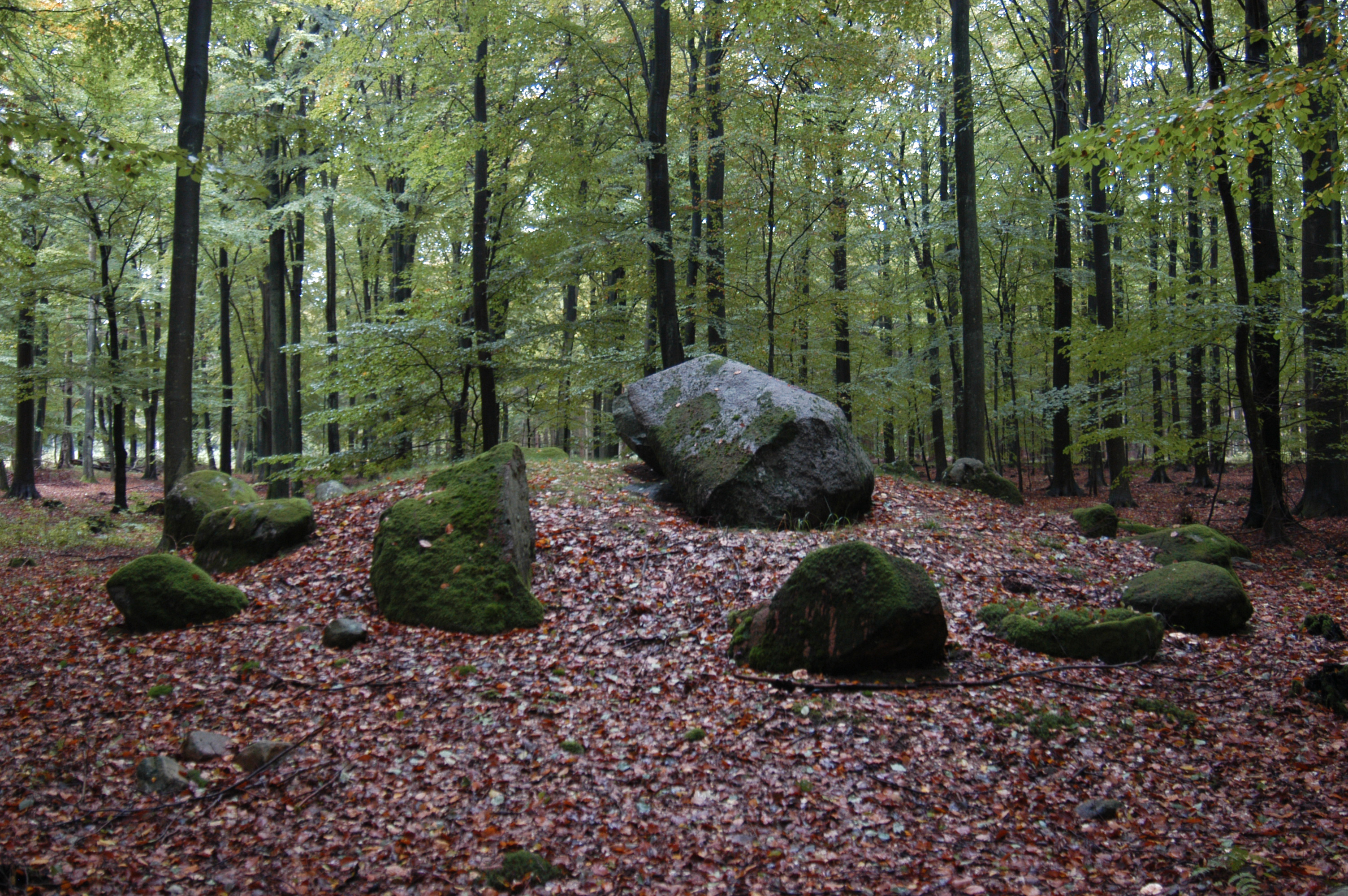 Dolmen in Denmark (Horserød hegn)-North Zealand